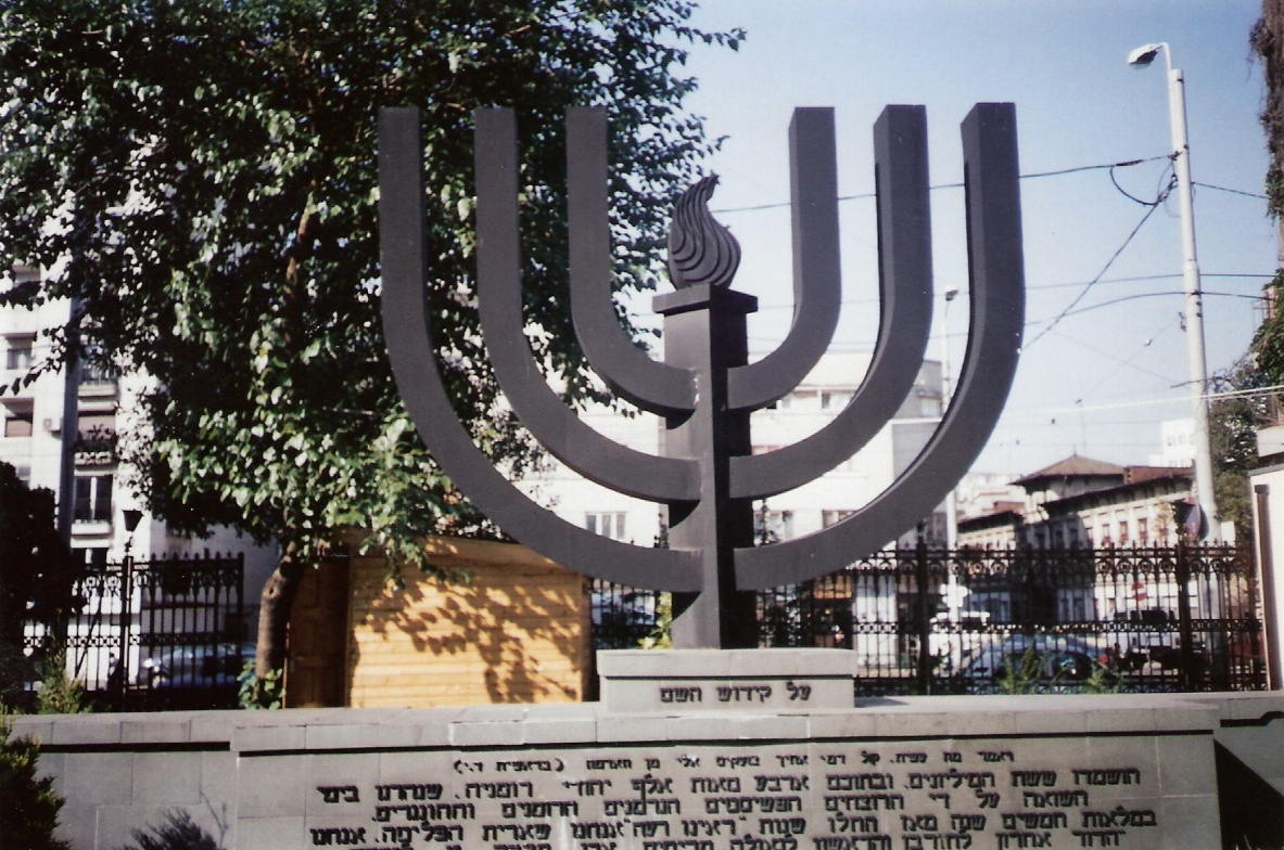 holocoast memorial,bucarest.